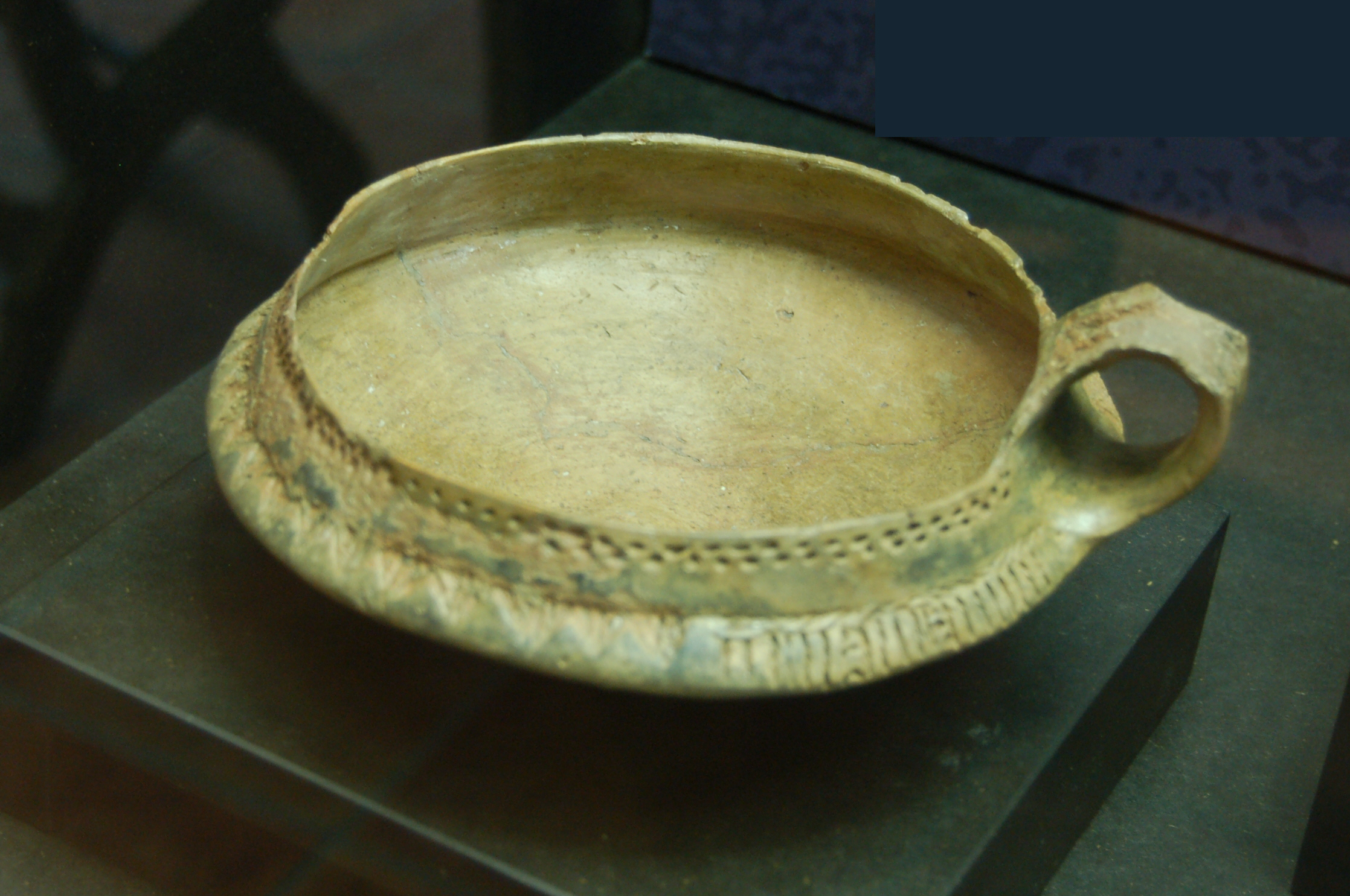 Nachbildung eines dünnwandigen Bechers aus der Oldendorfer Totenstatt.